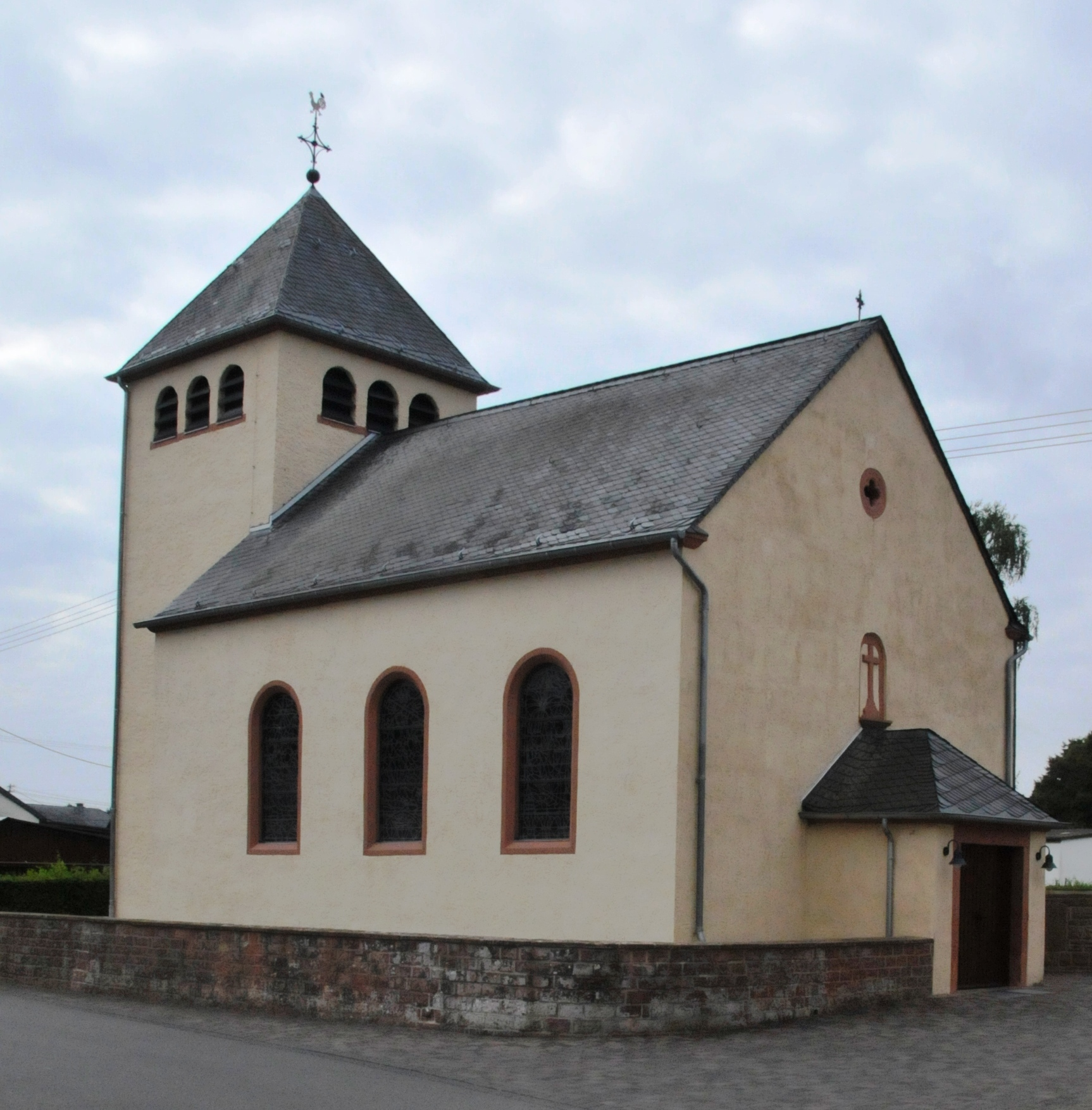 Hosten, Kirche